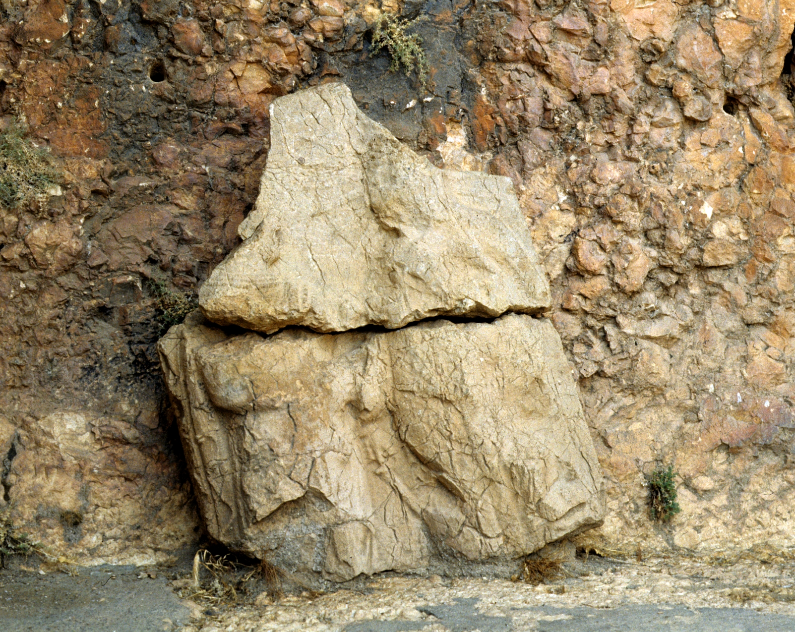 Arsameia am Nymphaios, Türkei, Kommagene, Dexiosis mit Mithras, Sockelanlage I